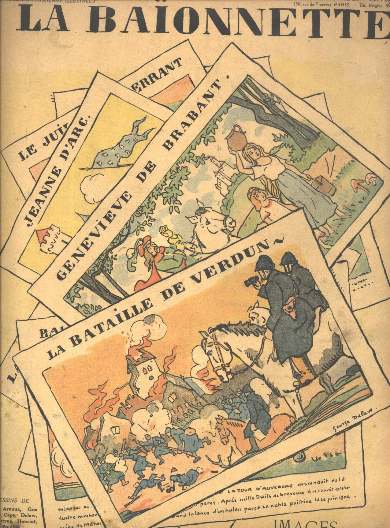 La Baîonnette 10 februray 1917